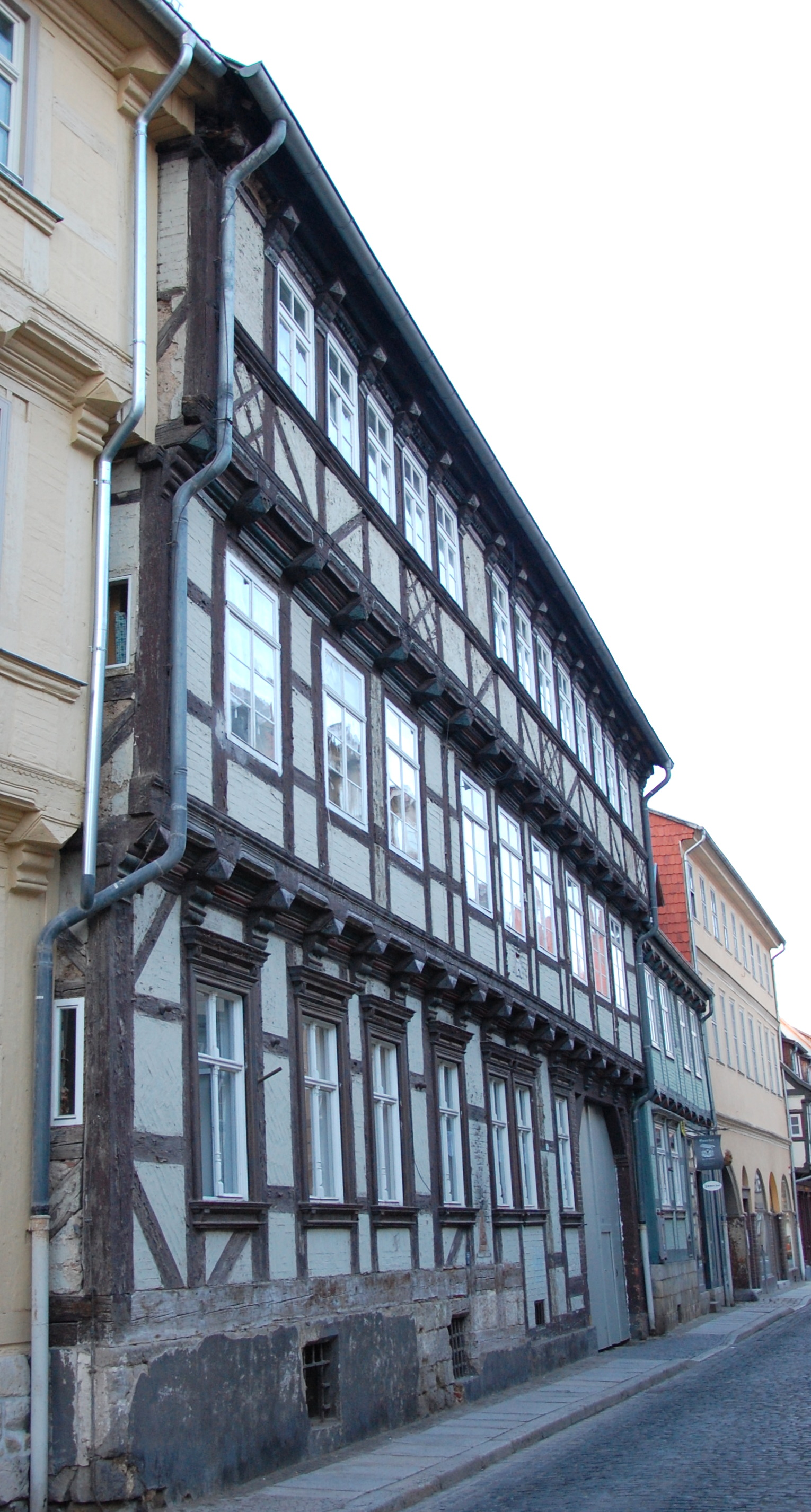 Haus Hohe Straße zwischen 25 und 26 in Quedlinburg